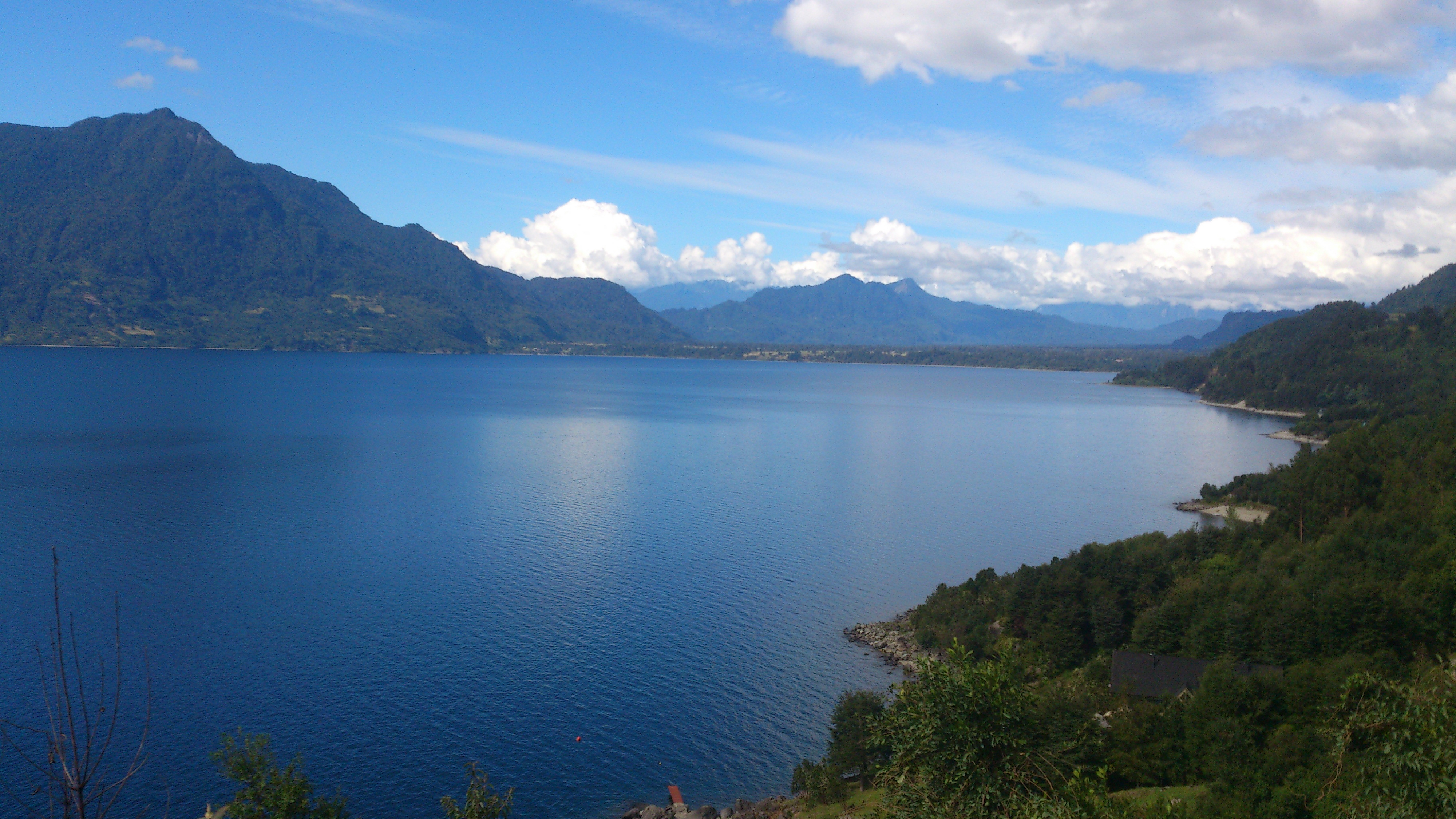 lago ranco chile